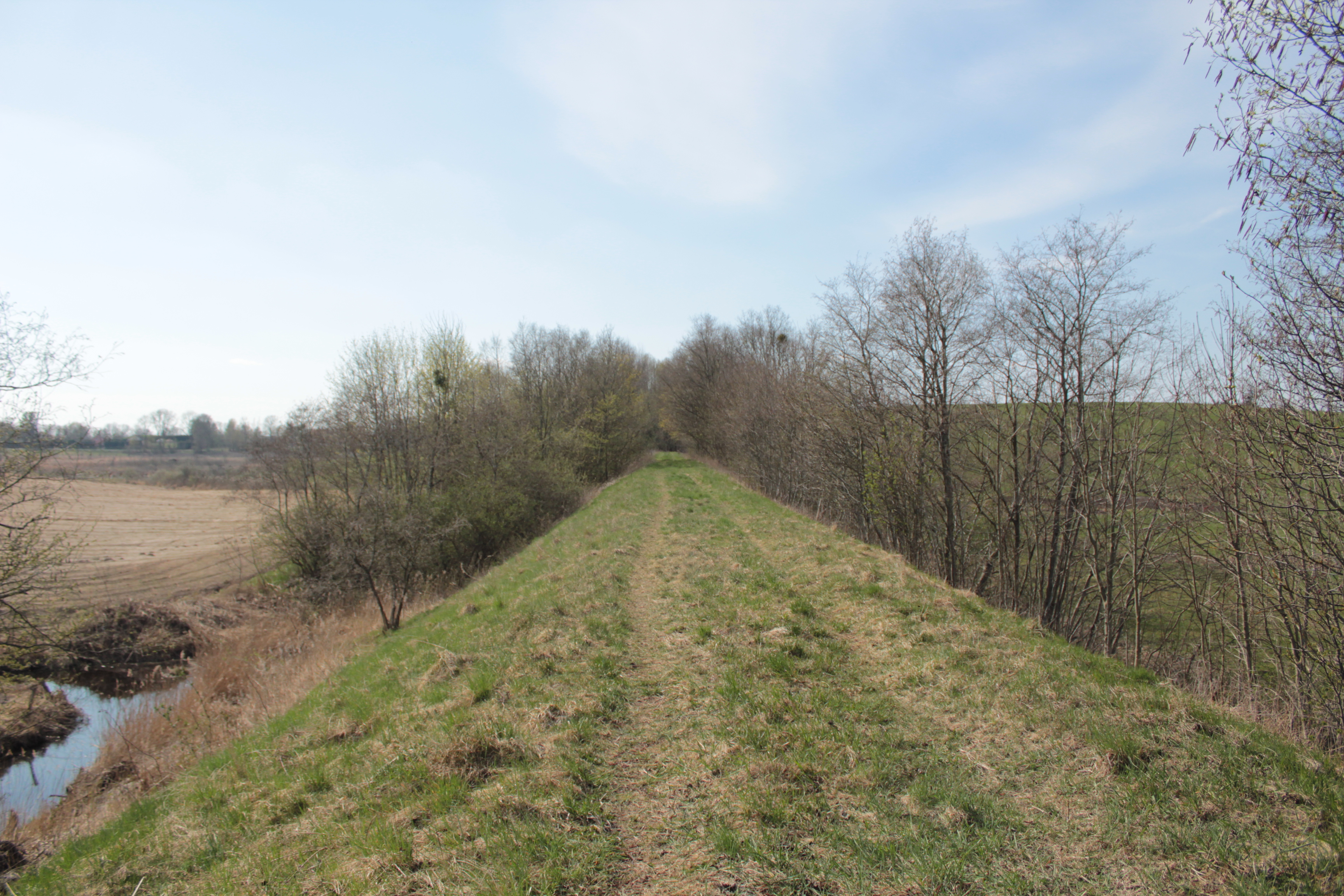 Widok na nasyp po rozebranej linii kolejowej Kruklanki - Olecko